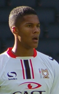 Jordan Spence